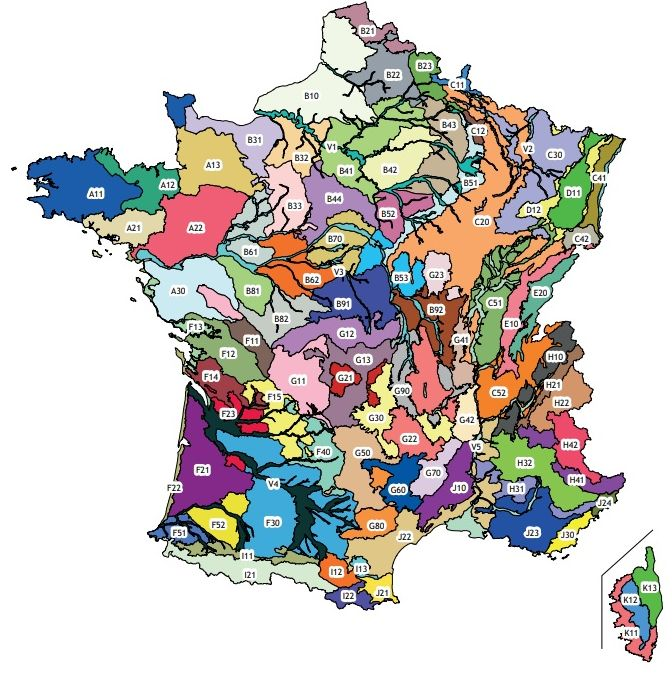 Sylvoécorégion